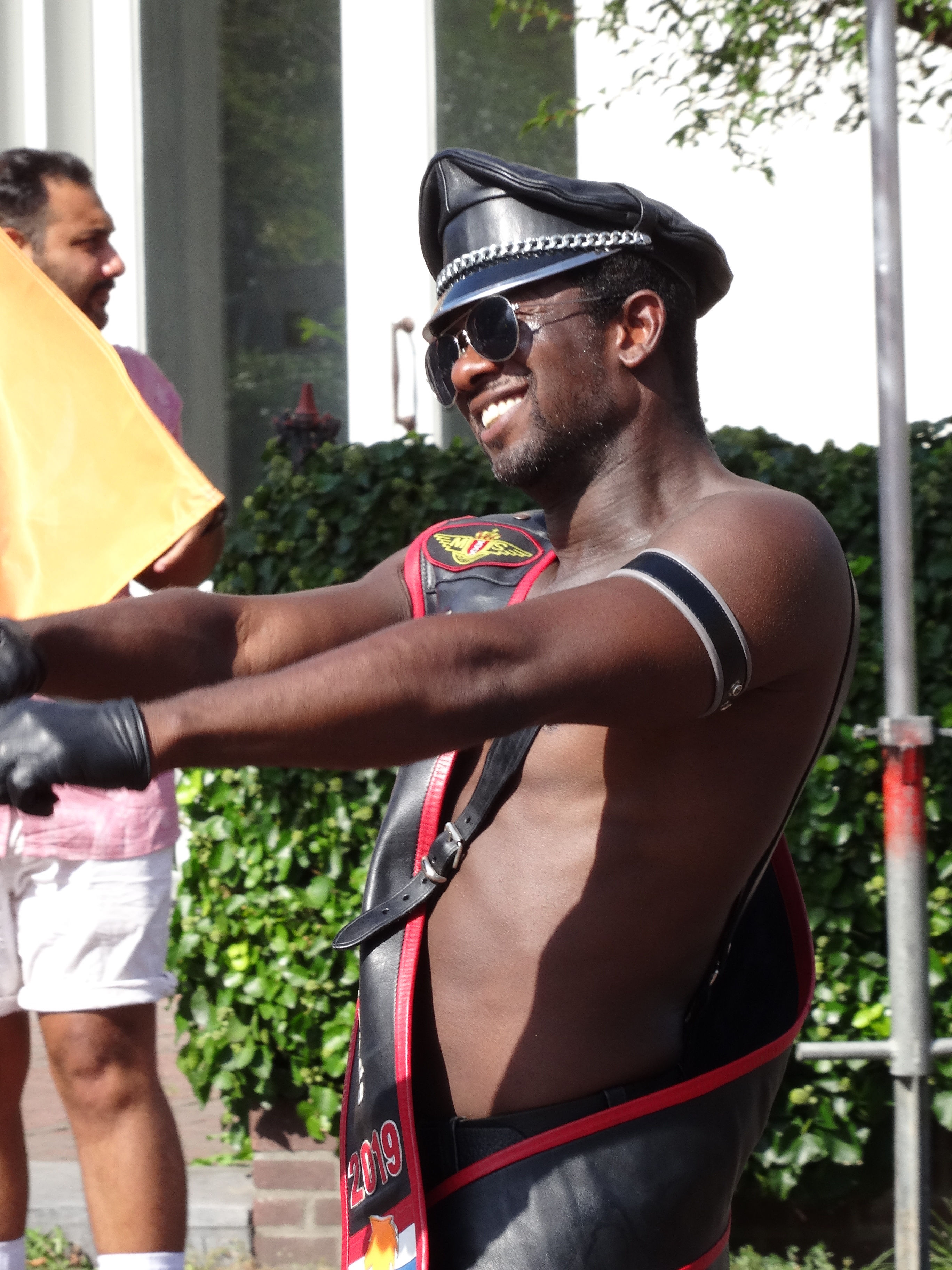 Axe Leito, Mr. Leather Netherlands, tijdens de Pride Parade bij Zwolle Pride 2019